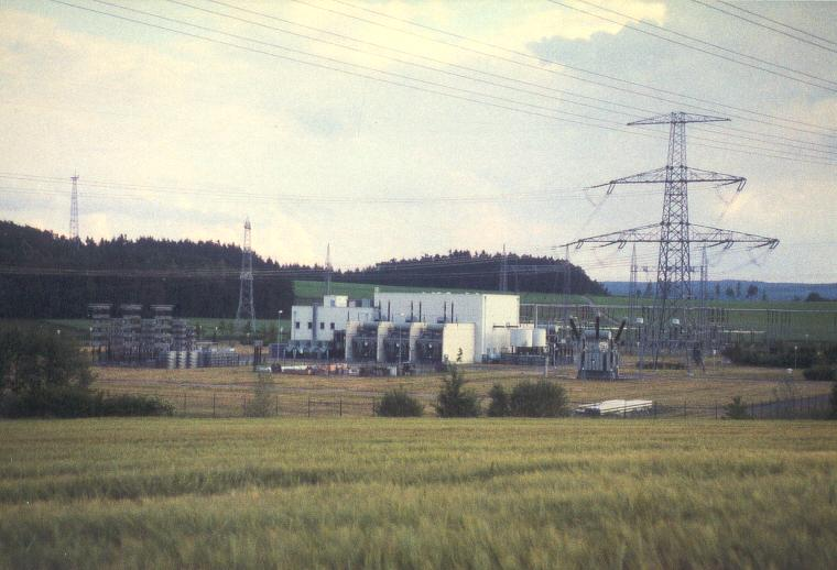 GKK Etzenricht (Zustand am 30.5.1998), Freiluftanlage und Stromrichterhalle, rechts Mast der Freileitungen Etzenricht–Hradec und Etzenricht–Přeštice nach Tschechien